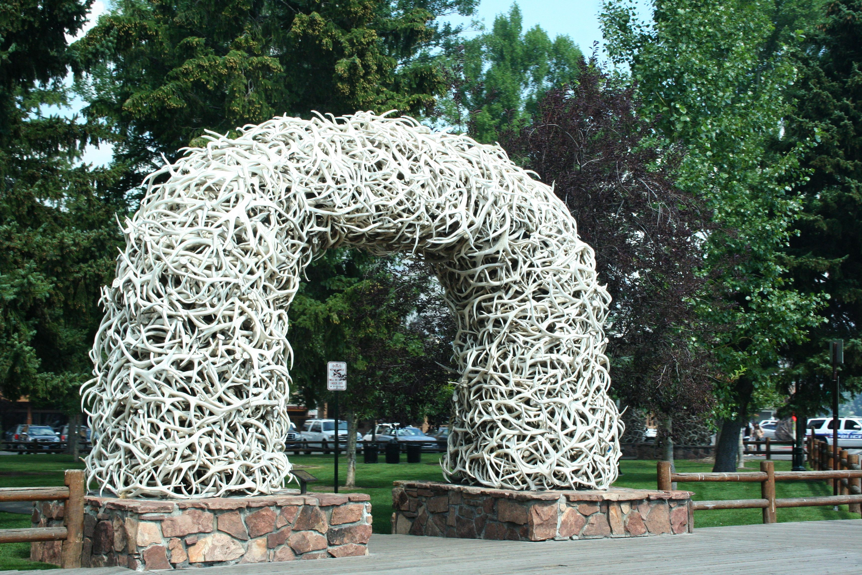 Jackson, Wyoming, brama z poroża jeleni